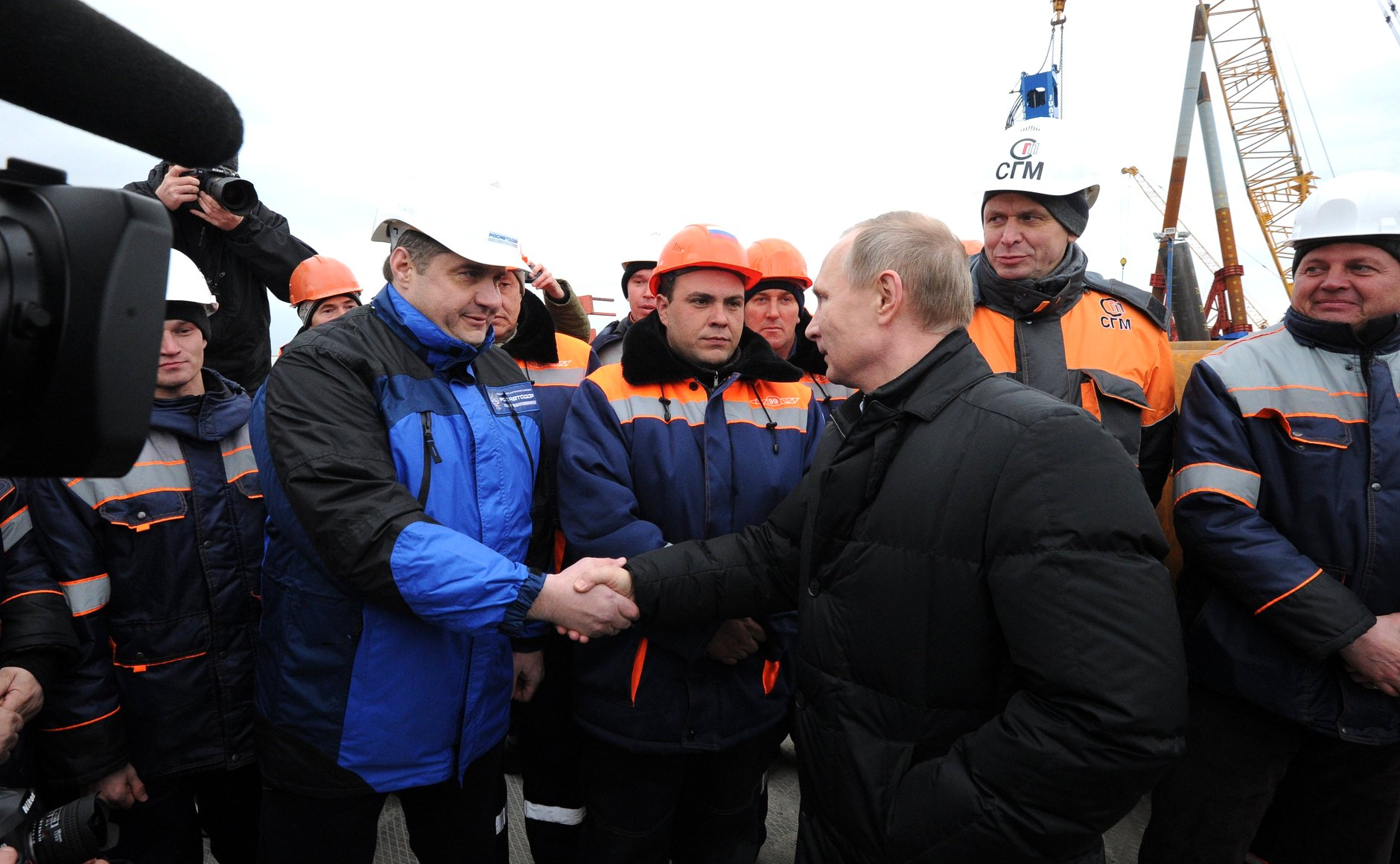 Владимир Путин во время посещения строительной площадки транспортного перехода через Керченский пролив